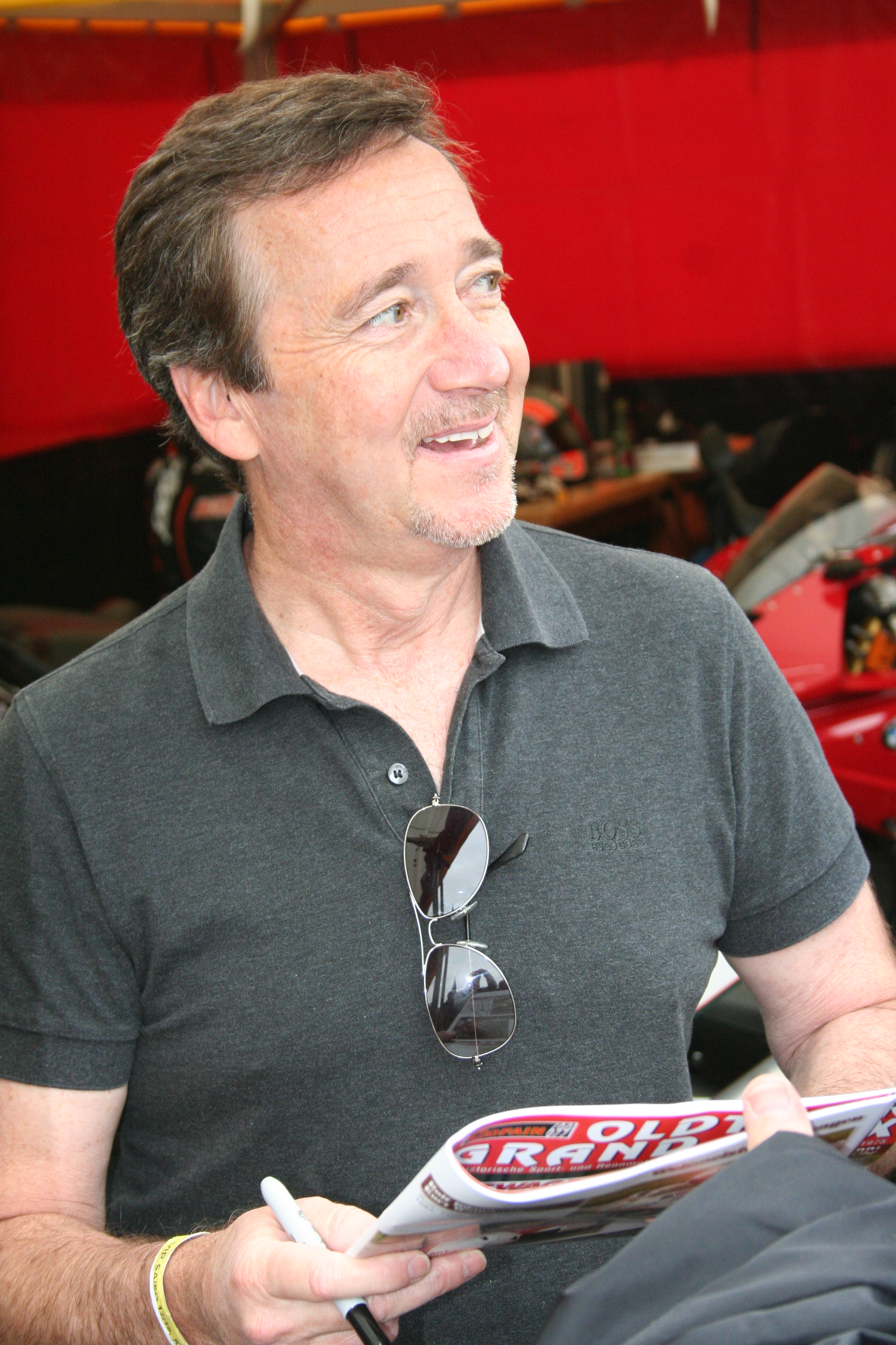 Freddie Spencer beim Oldtimer Grand Prix in Schwanenstadt, Oberösterreich, am 18. September 2016